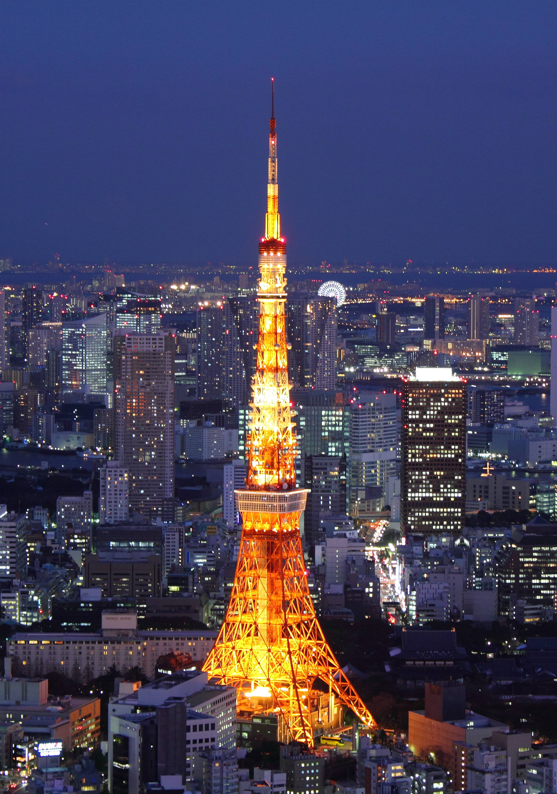 東京タワー（六本木ヒルズ屋上より）